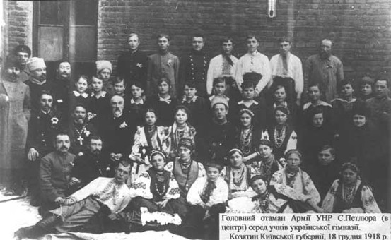 Головний отаман військ УНР С. Петлюра серед учнів української гімназії. Козятин Київської губернії 18 грудня, 1918